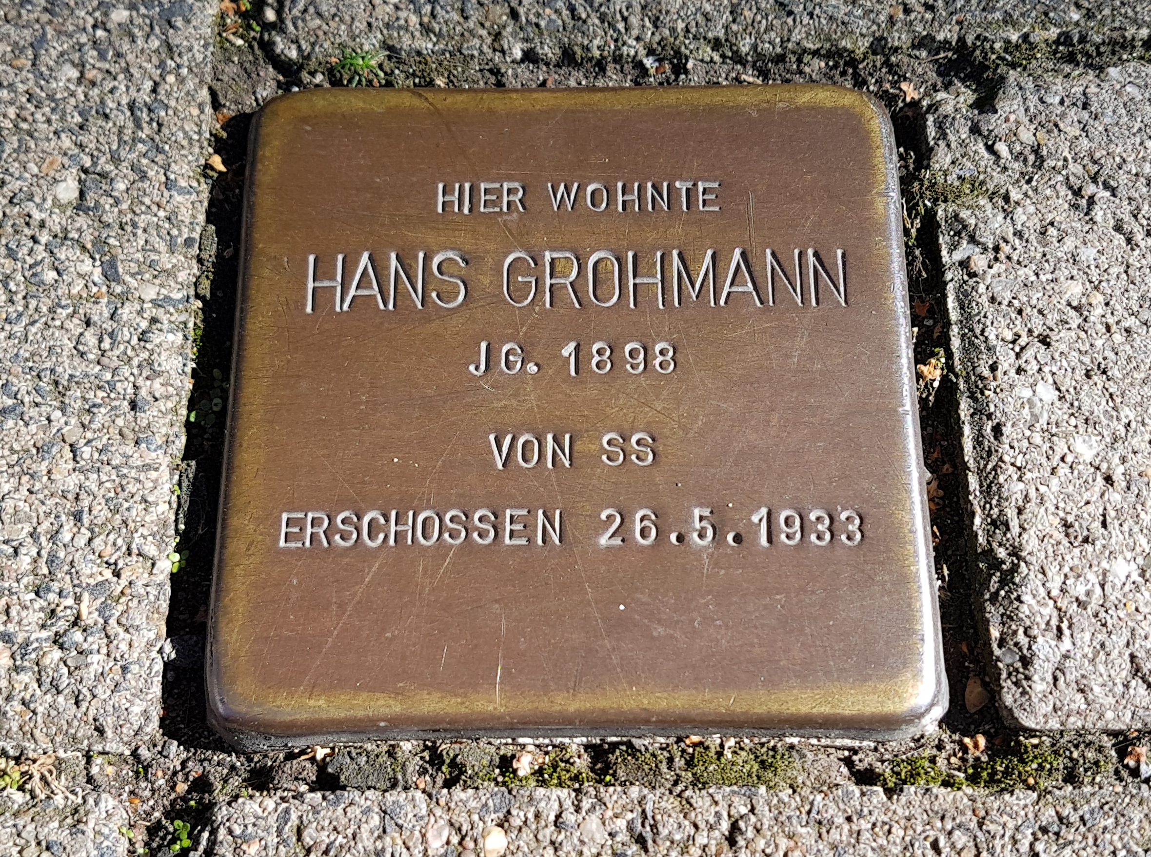 Stolperstein Duisburg Hans Grohmann